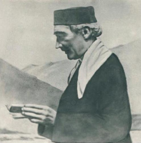 Luigi Parazzi (1834-1914)